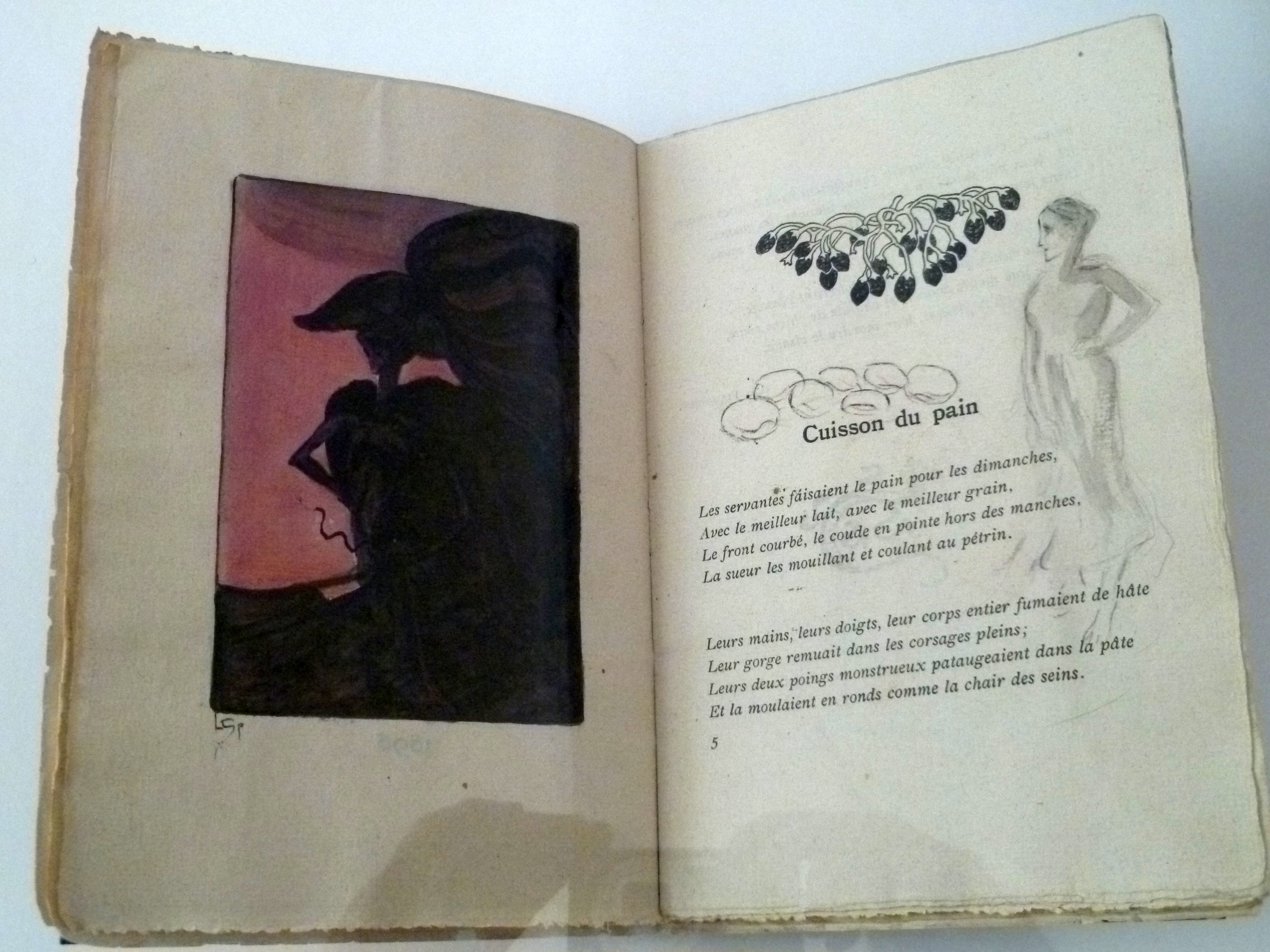 links: "De Dood te paard"; rechts "Bakkerin; Cuisson du pain" in "Petites Légendes" (Emile Verhaeren) met illustraties door de Belgische kunstschilder Léon Spilliaert (1881-1946); Oost-Indische inkt, penseel, pen, kleurpotlood, aquarel op papier; Koninklijke Bibliotheek, Brussel, België